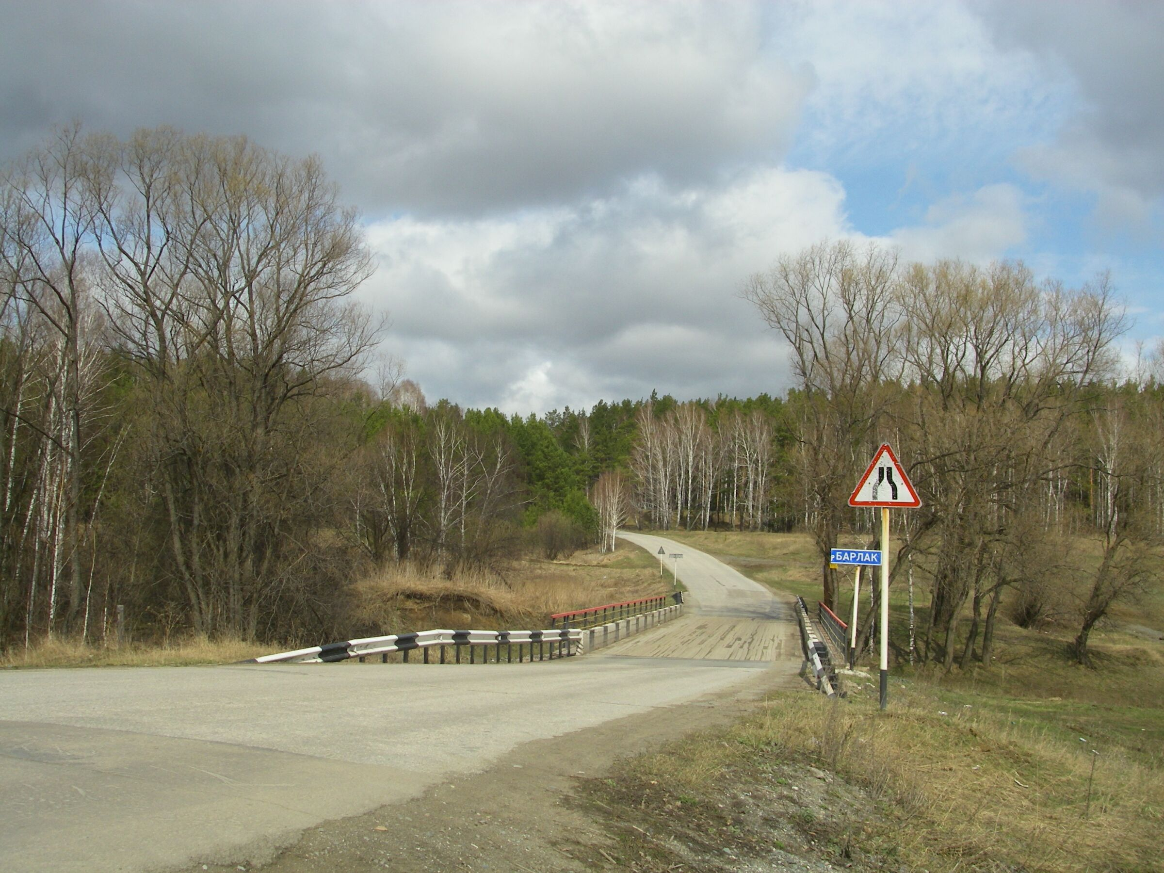 Мост через реку Барлак. Bridge on the River Barlak